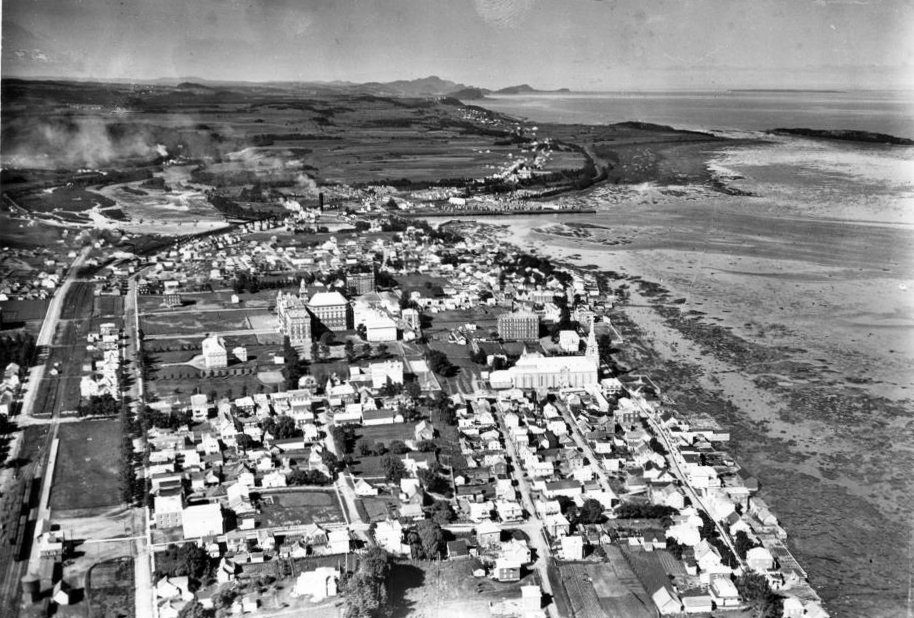 Vue aérienne de la ville de Rimouski. On reconnaît notamment l'évêché, le séminaire et la cathédrale Saint-Germain de Rimouski. À droite, le fleuve Saint-Laurent